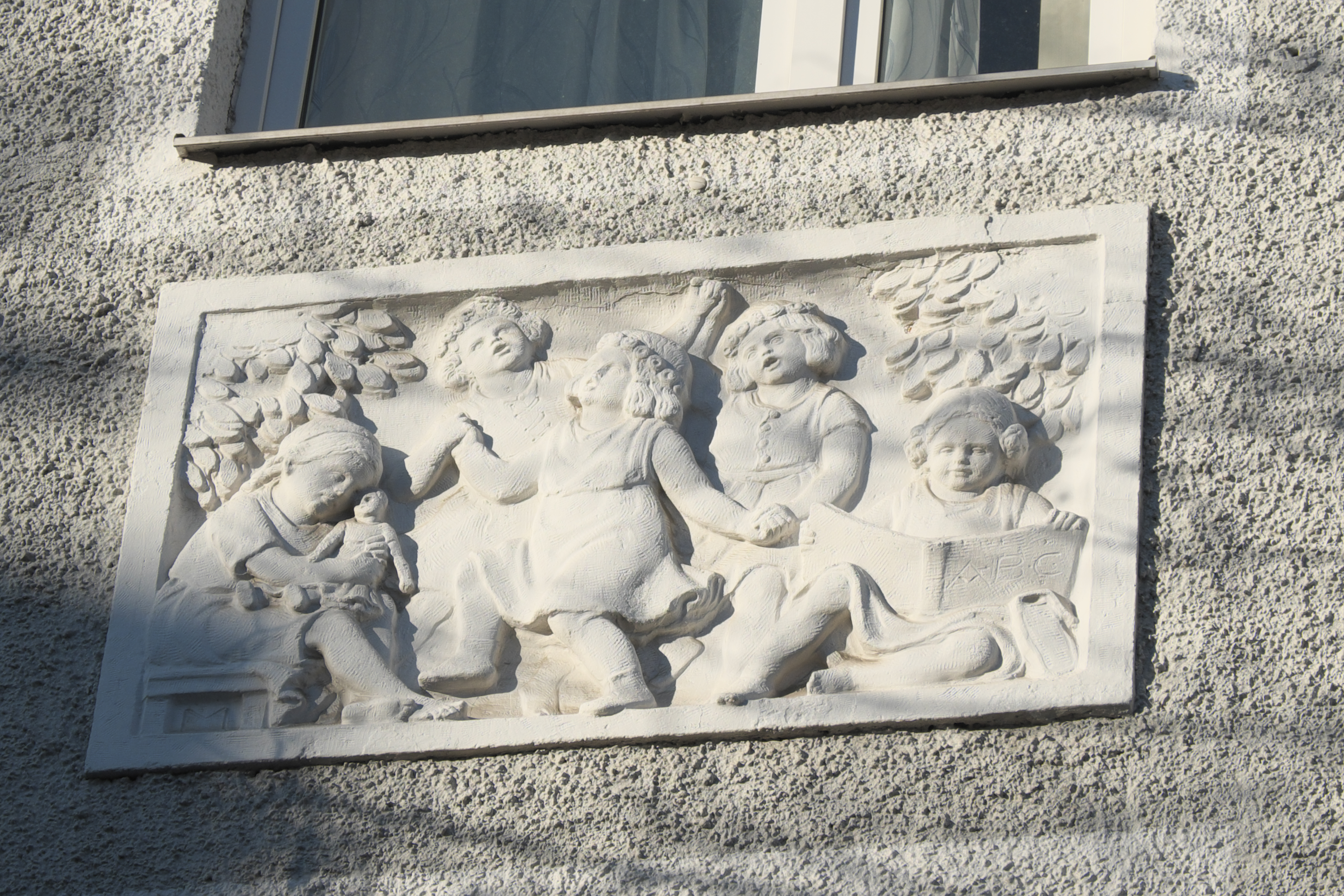 Bäckerstraße 22/Ecke Josef-Retzer-Straße 42 (München) in Pasing im Stadtbezirk Pasing-Obermenzing in München (Bayern/Deutschland), Relief